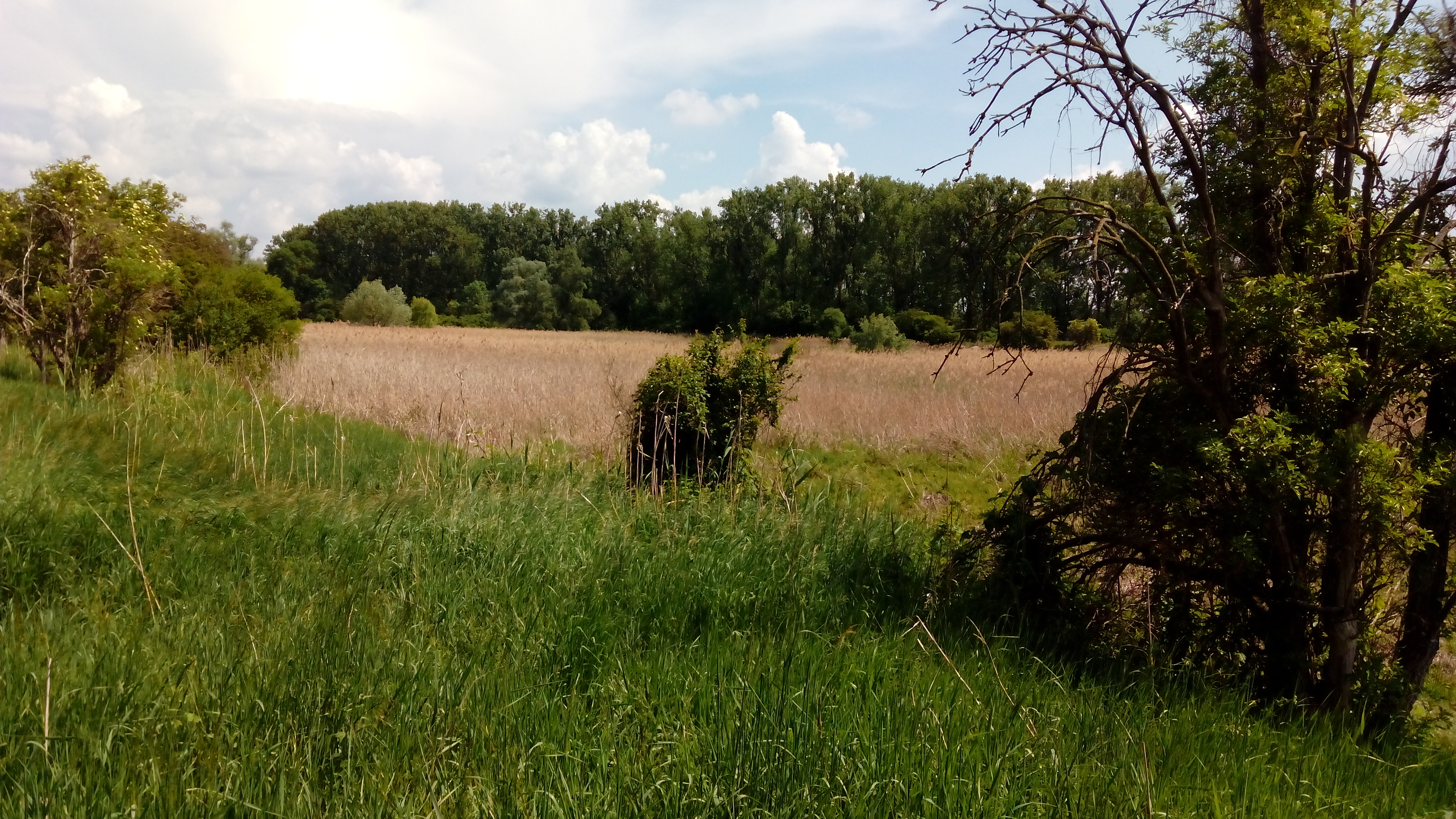 (NSG:RP-7319-019)_Wormser Ried Ansicht des Naturschutzsgebiets "Wormser Ried" aus nördlicher Richtung, ungefähr von Geo-Koordinate 49°36'22.0"N 8°23'00.9"E